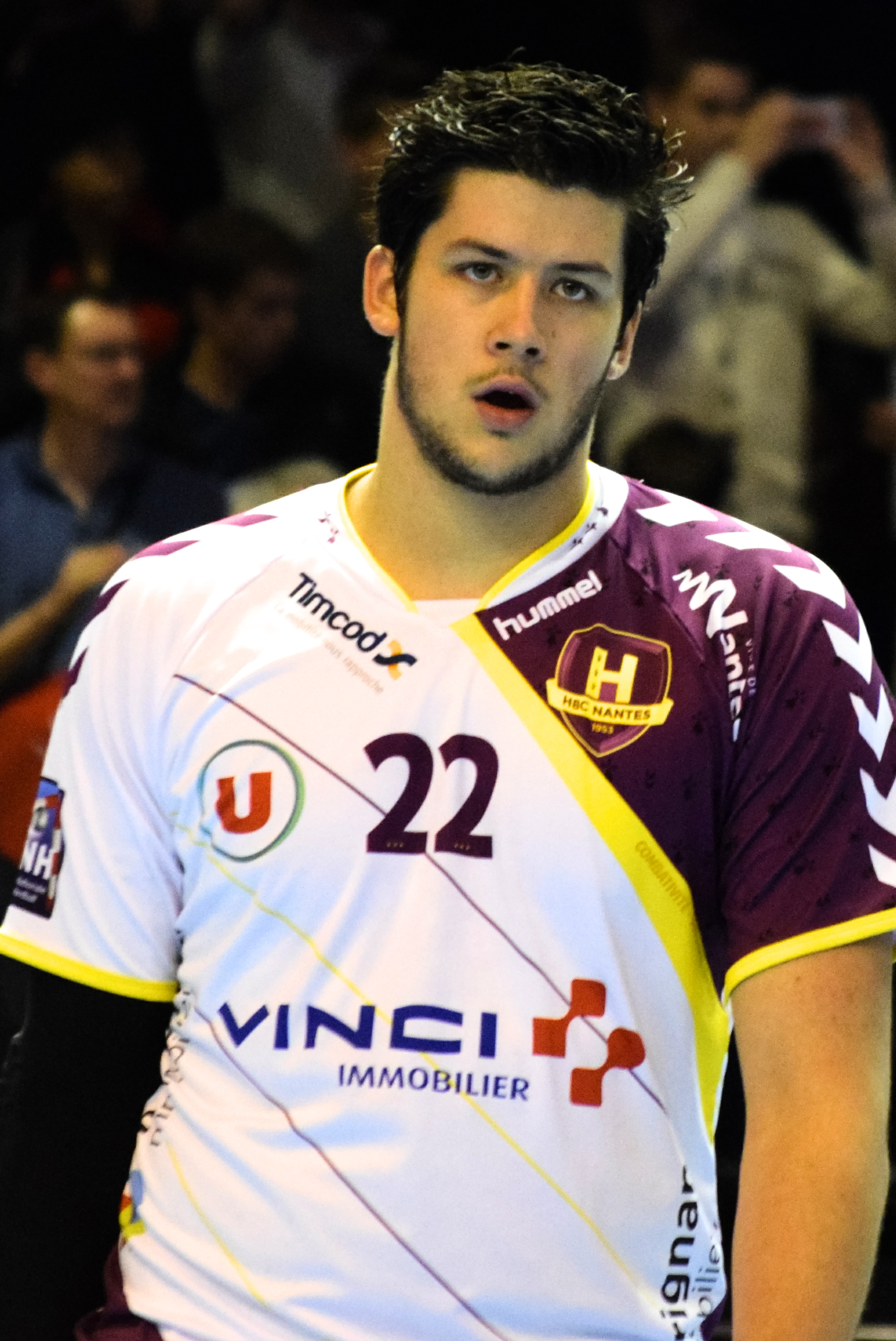 Nicolas Tournat, pivot du club de handball HBC Nantes lors du match comptant pour la 7e journée du championnat de France de handball (PSG Handball - HBC Nantes). Le 22 octobre 2014 à la Halle Carpentier, Apris 13e.